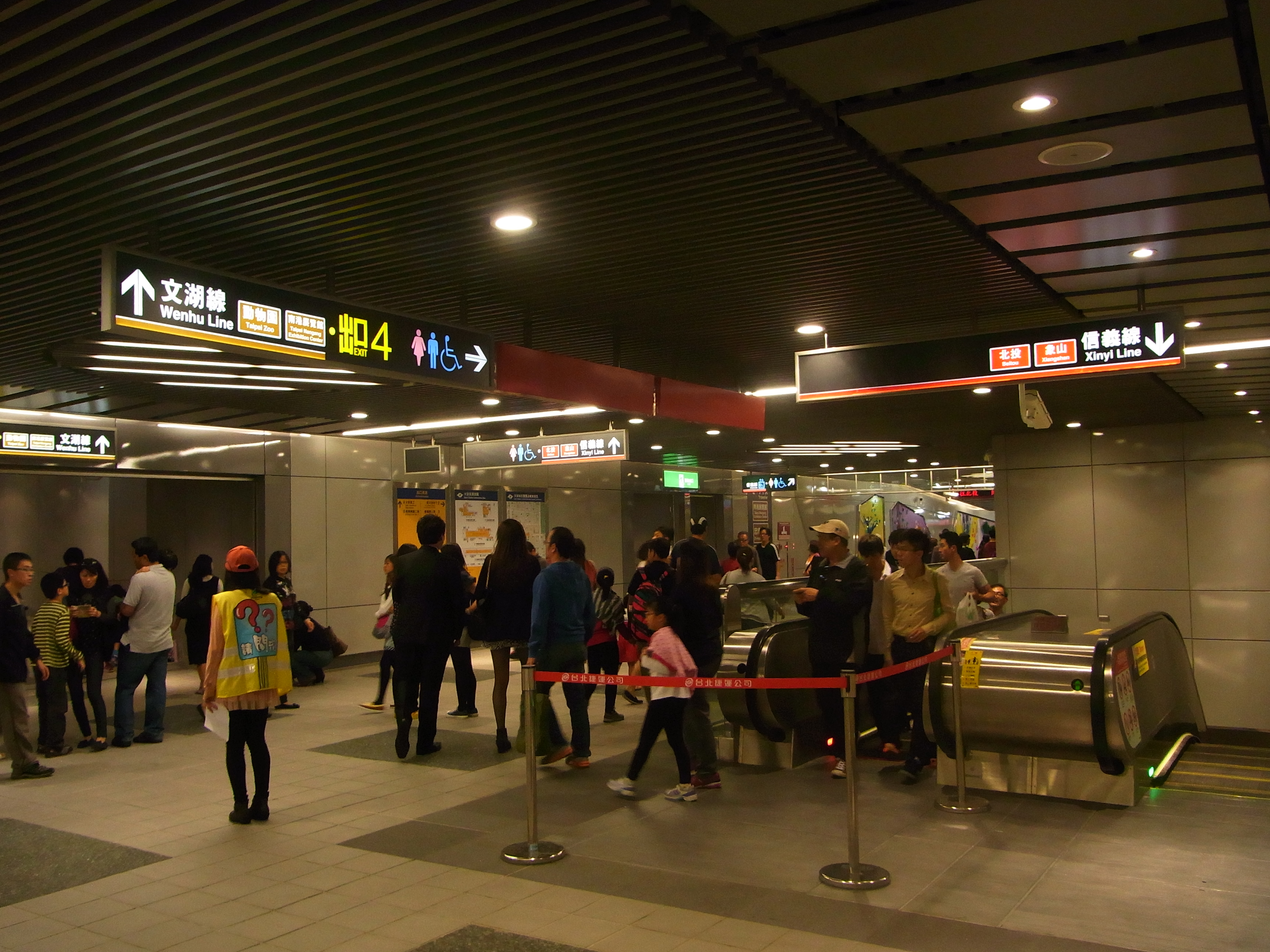 台北捷運大安站文湖線、信義線轉換層